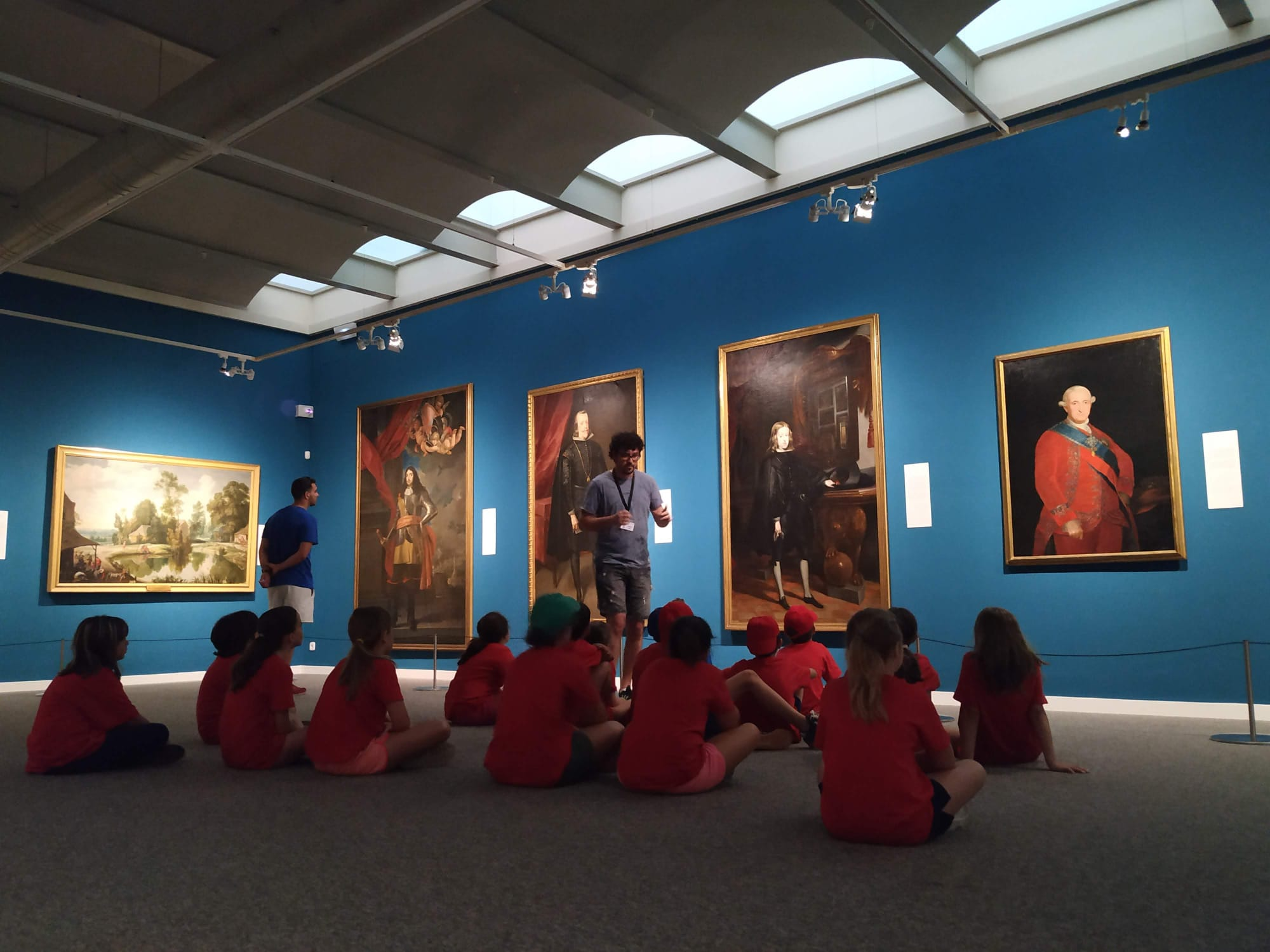 Guia del Museu Balaguer fent visita escolar a la Sala Prado